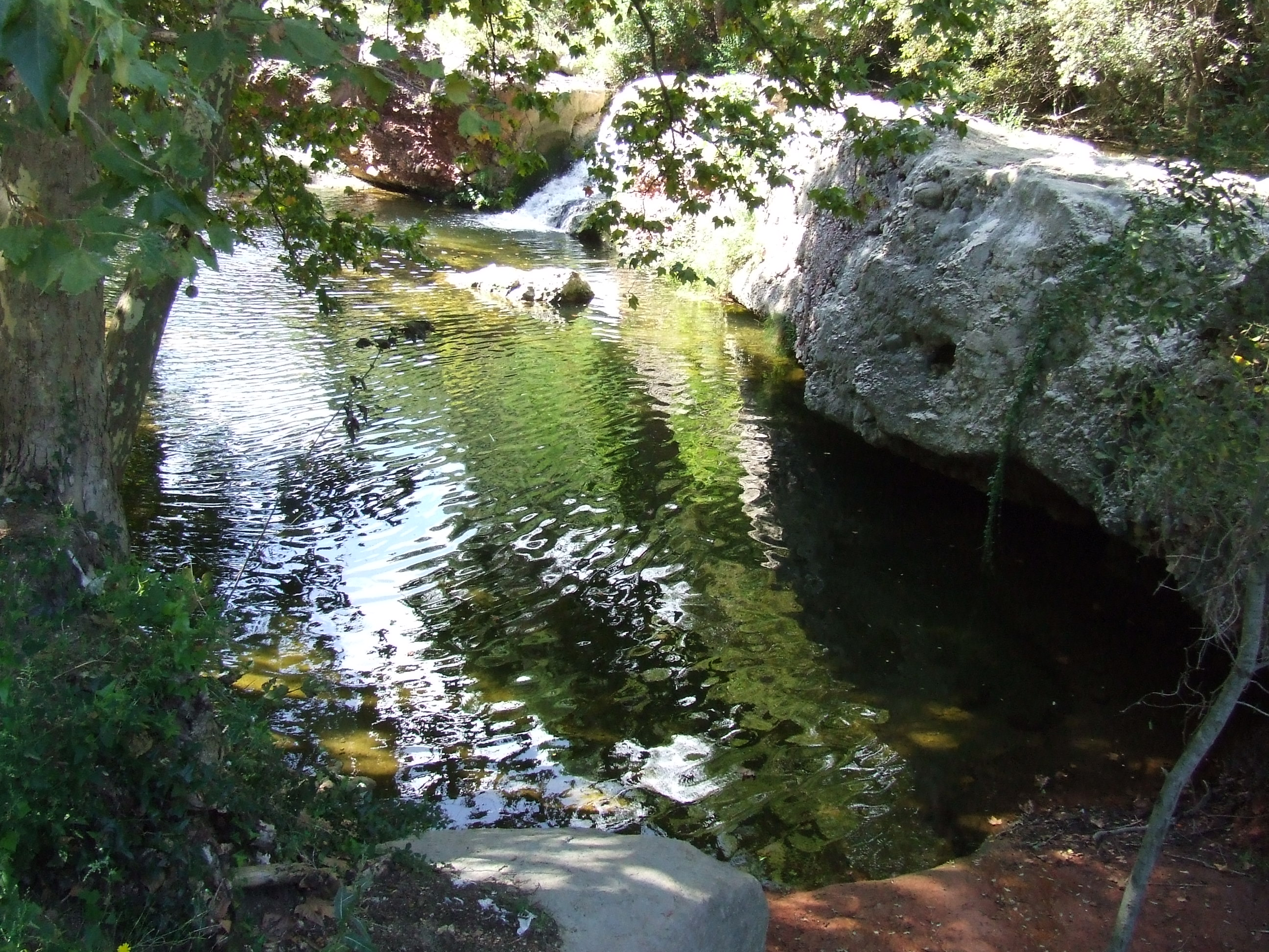 El Gorg d'en Jeroni (Riells del Fai, Bigues i Riells, Vallès Oriental)